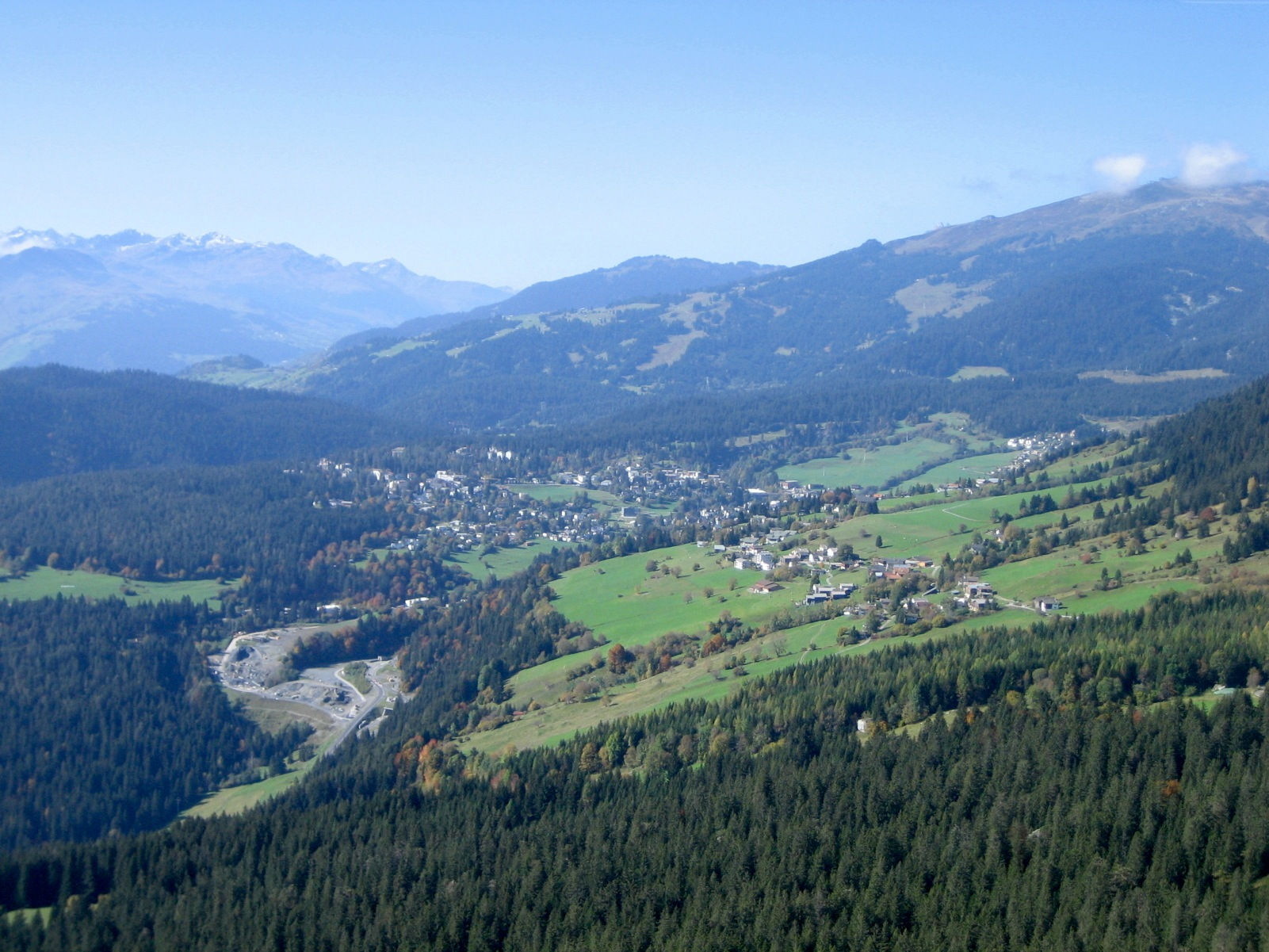 Das Hochtal von Flims, links Waldhaus, rechts Fidaz